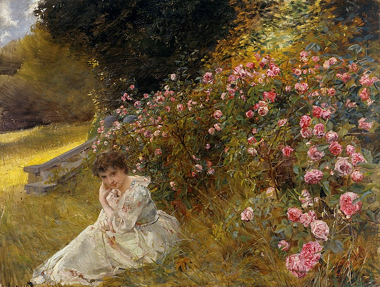 Clara von Rappard: Miss Hardy auf der Rosenterrasse im Rugen (Interlaken), 1883. Öl auf Leinwand, 65,3 x 85,8 cm, Kunstmuseum Bern